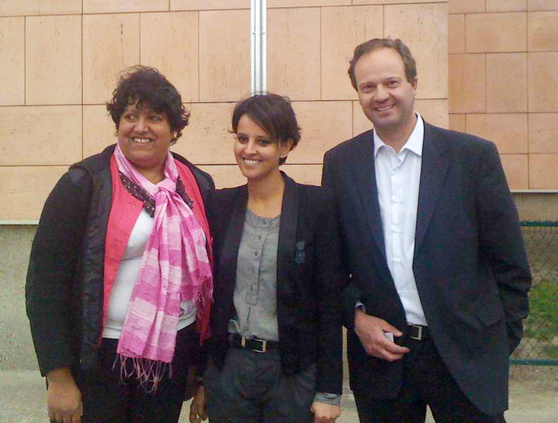 Jean-Marc Germain, député socialiste de la douzième circonscription des Hauts-de-Seine élu le 17 juin 2012, ici à Châtillon le 6 juin 2012 (Hauts-de-Seine) en compagnie de sa suppléante Martine Gouriet et de Najat Vallaud-Belkacem, ministre des Droits des femmes et porte-parole du gouvernement de Jean-Marc Ayrault.